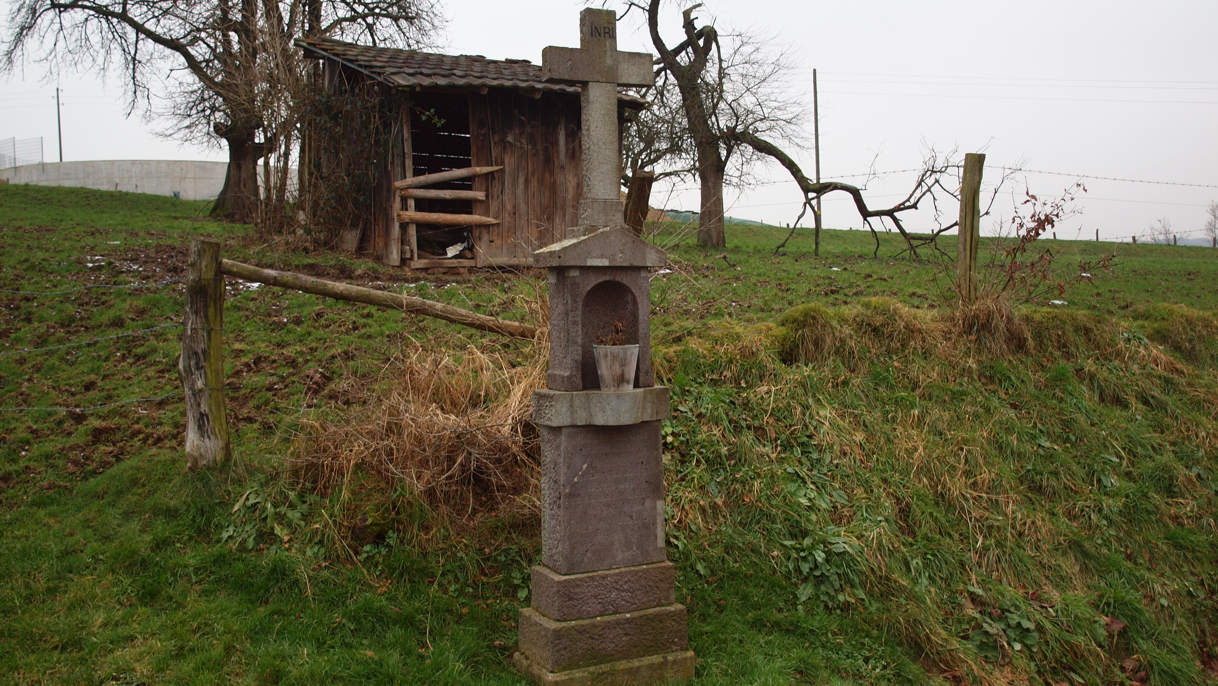 Denkmalgeschütztes Wegekreuz, (gegenüber) Im Grabenhof 10, Fernegierscheid, Stadt Hennef (Sieg)